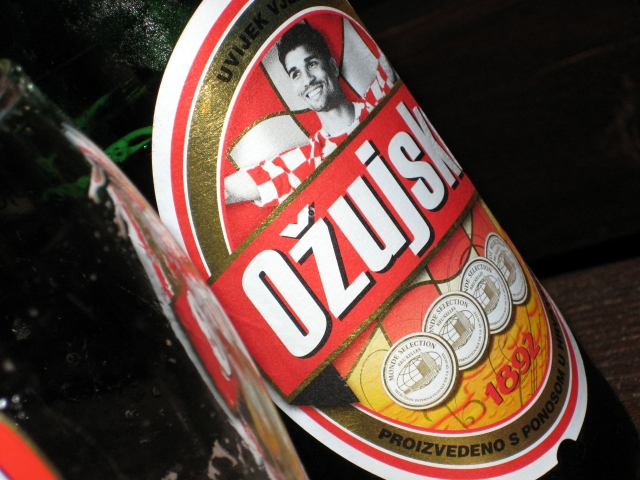 Posebno izdanje Ožujskog piva povodom Europskog nogometnog prvenstva 2008. godine, Eduardo Alves da Silva